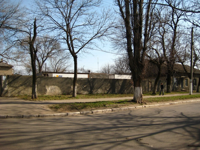 На этом месте располагалось здание синагоги мясников